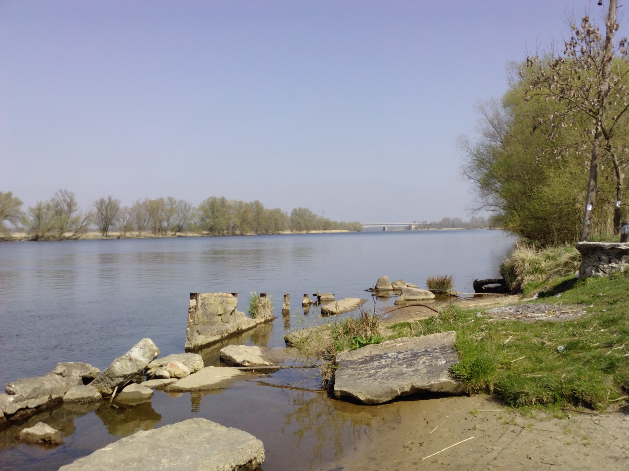 Nabrzeże w Łubnicy w 2009 roku. Zdjęcie archiwalne.